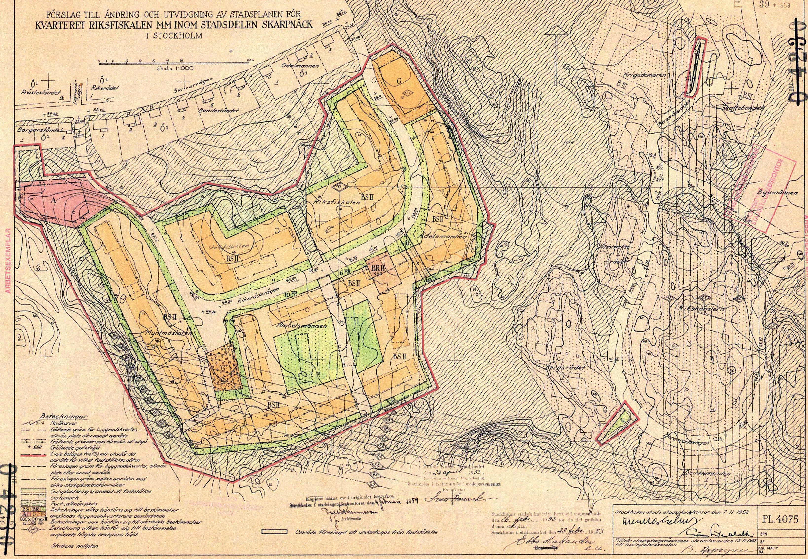 Stadsplan för södra delen av Riksrådsvägen i Stockholm